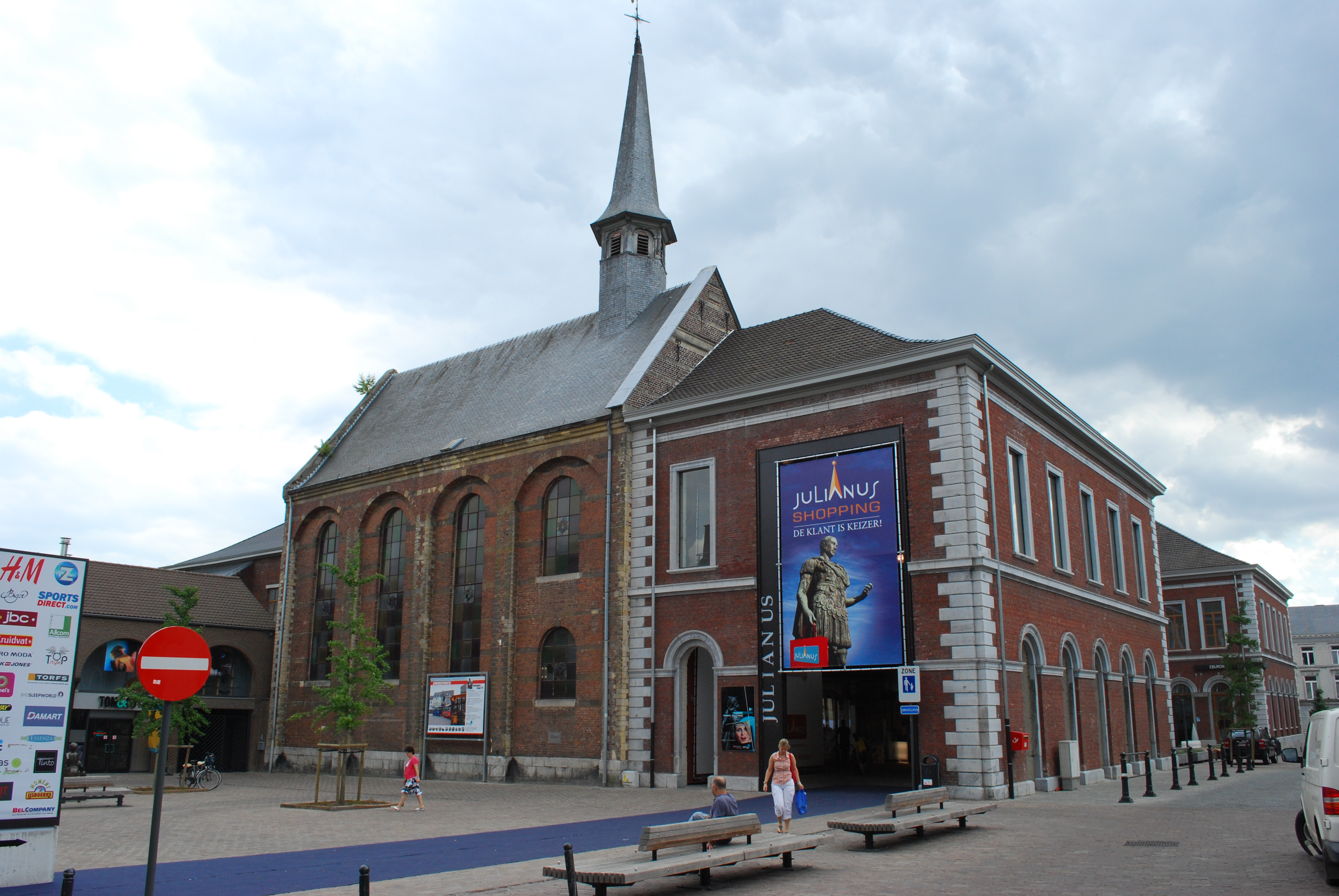 Tongres : chapelle de l'hospice, dédiée à Saint-Jacques.